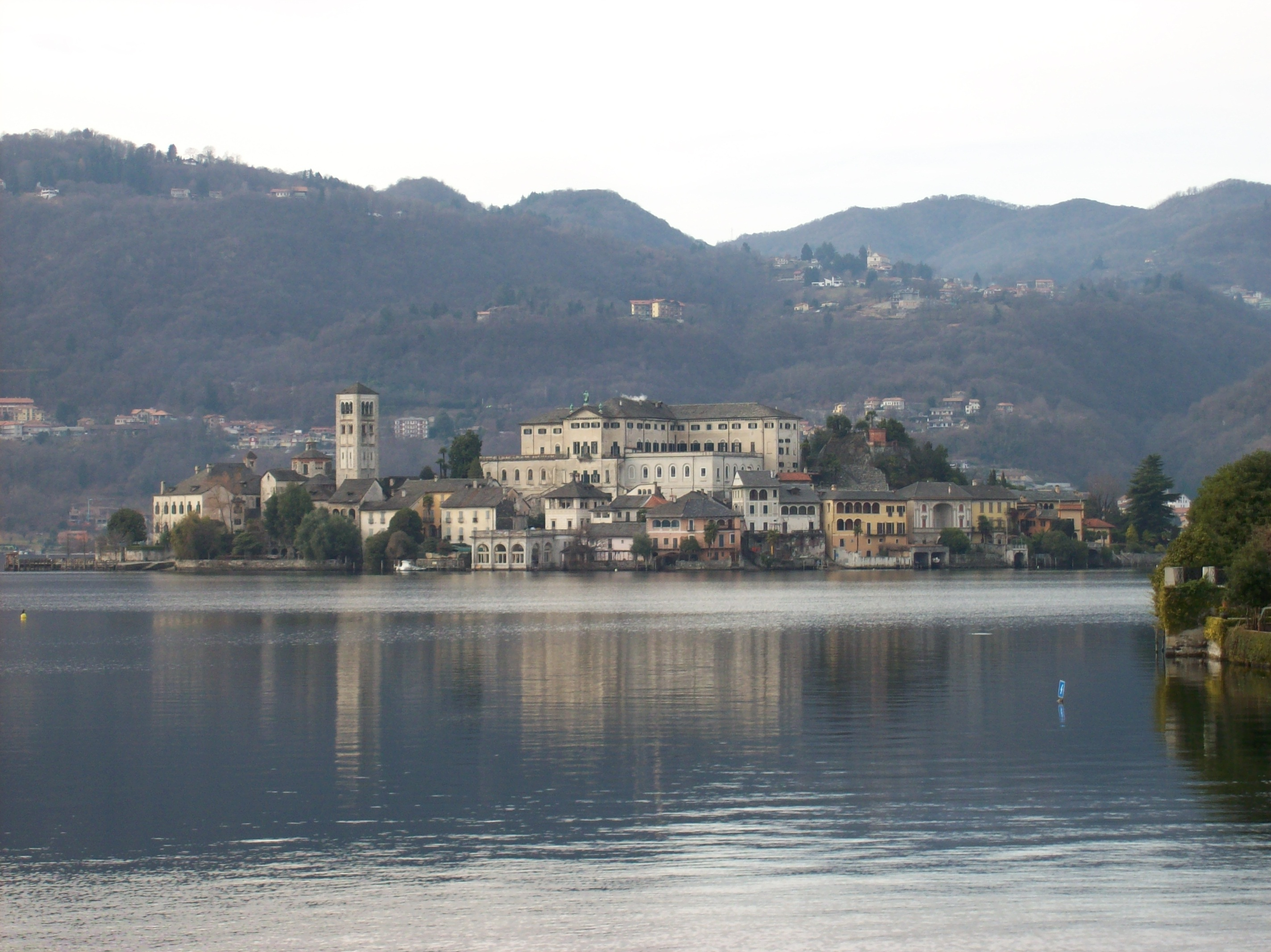 Isola di San Giulio nel lago d'Orta (provincia di Novara)